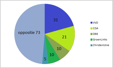 akkoord